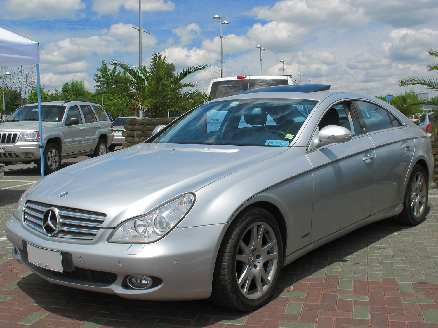 cls 2006